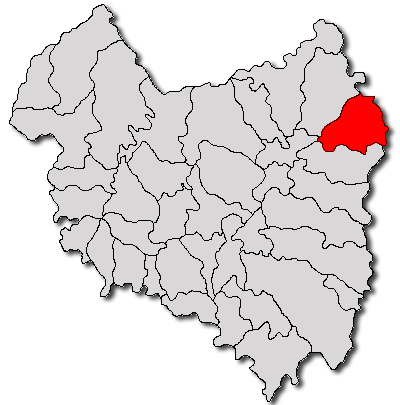 Categorie:Hărţi ale judeţului Covasna